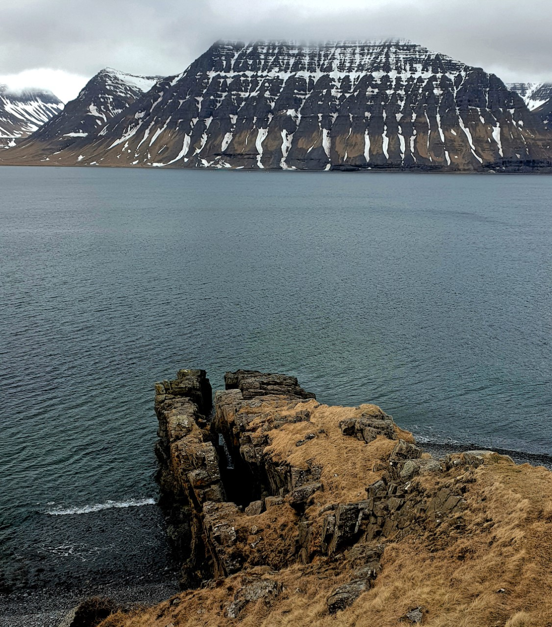 Klofningur í Önundarfirði